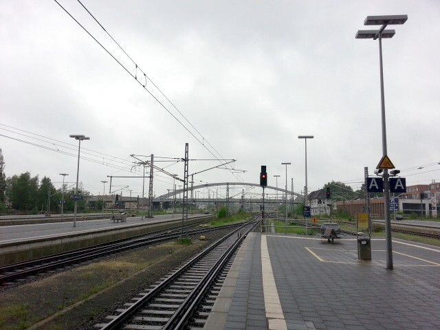 Sankt Lorenz Bruecke from Luebeck Hbf